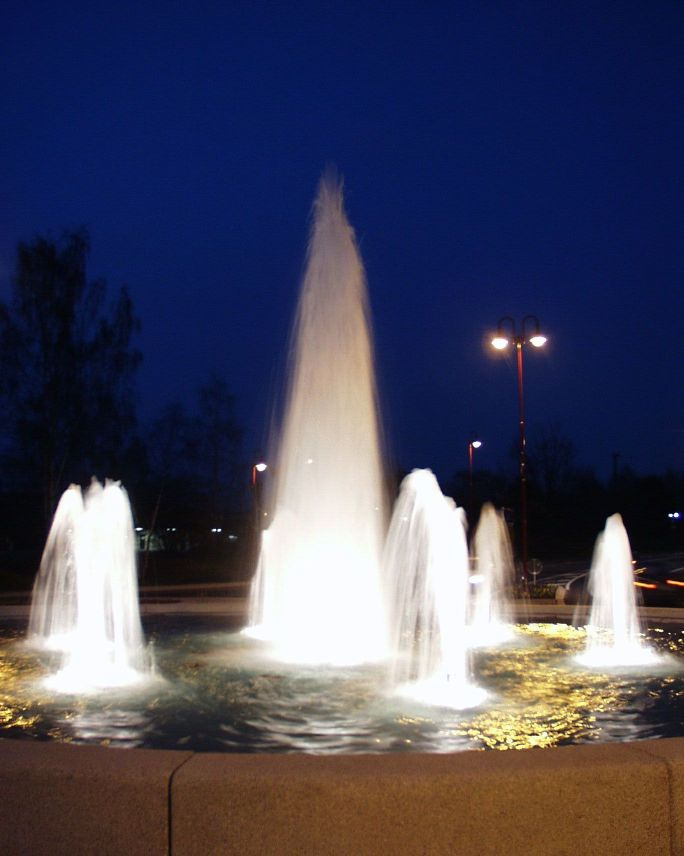 Brunnen im Kreisverkehr L3290/Herrenwaldstraße in Stadtallendorf